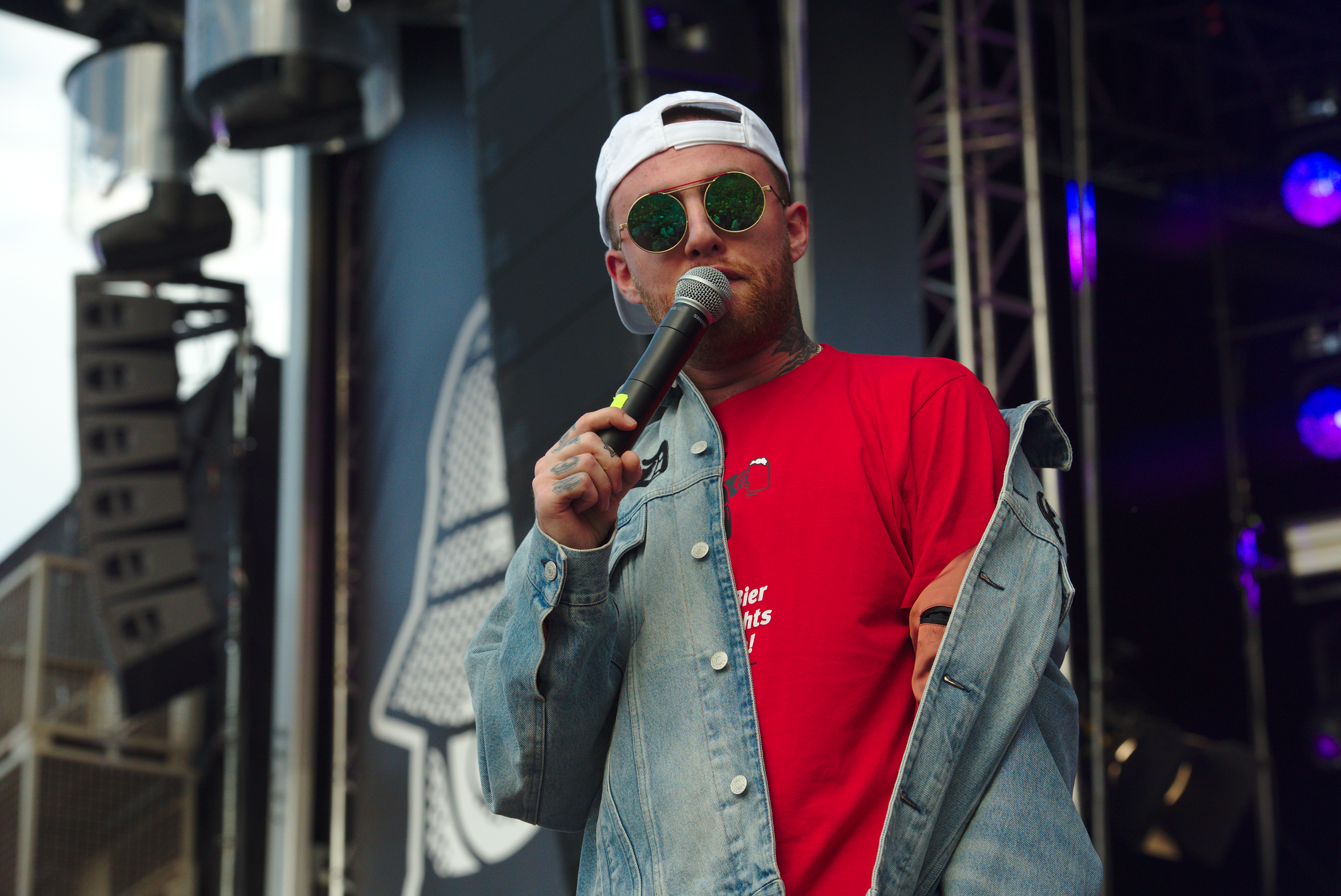 Der US-amerikanische Rapper Mac Miller beim splash! Festival 20 (2017).